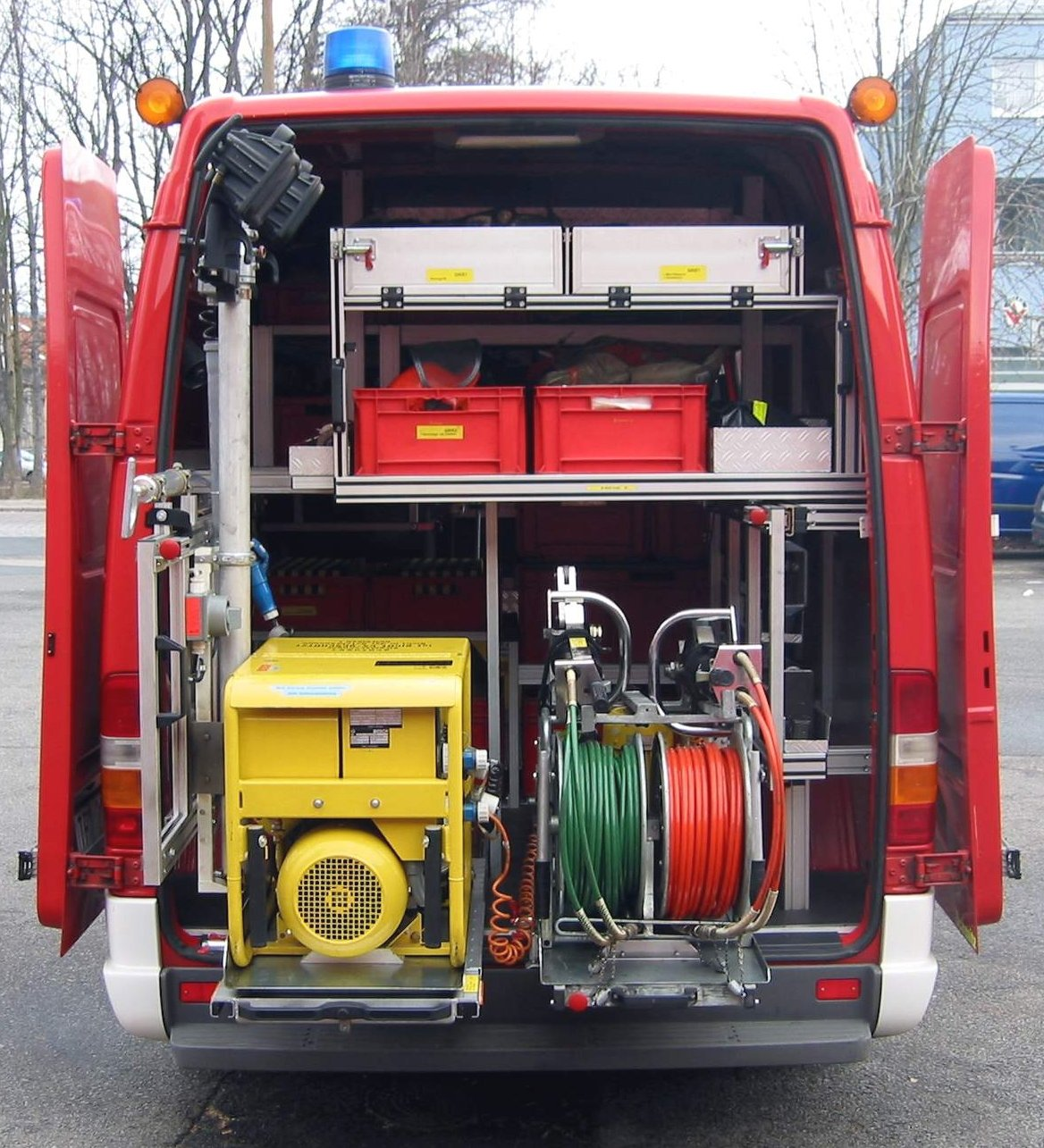 Heckansicht eines Vorausrüstwagen, (auf Mercedes-Benz Sprinter)